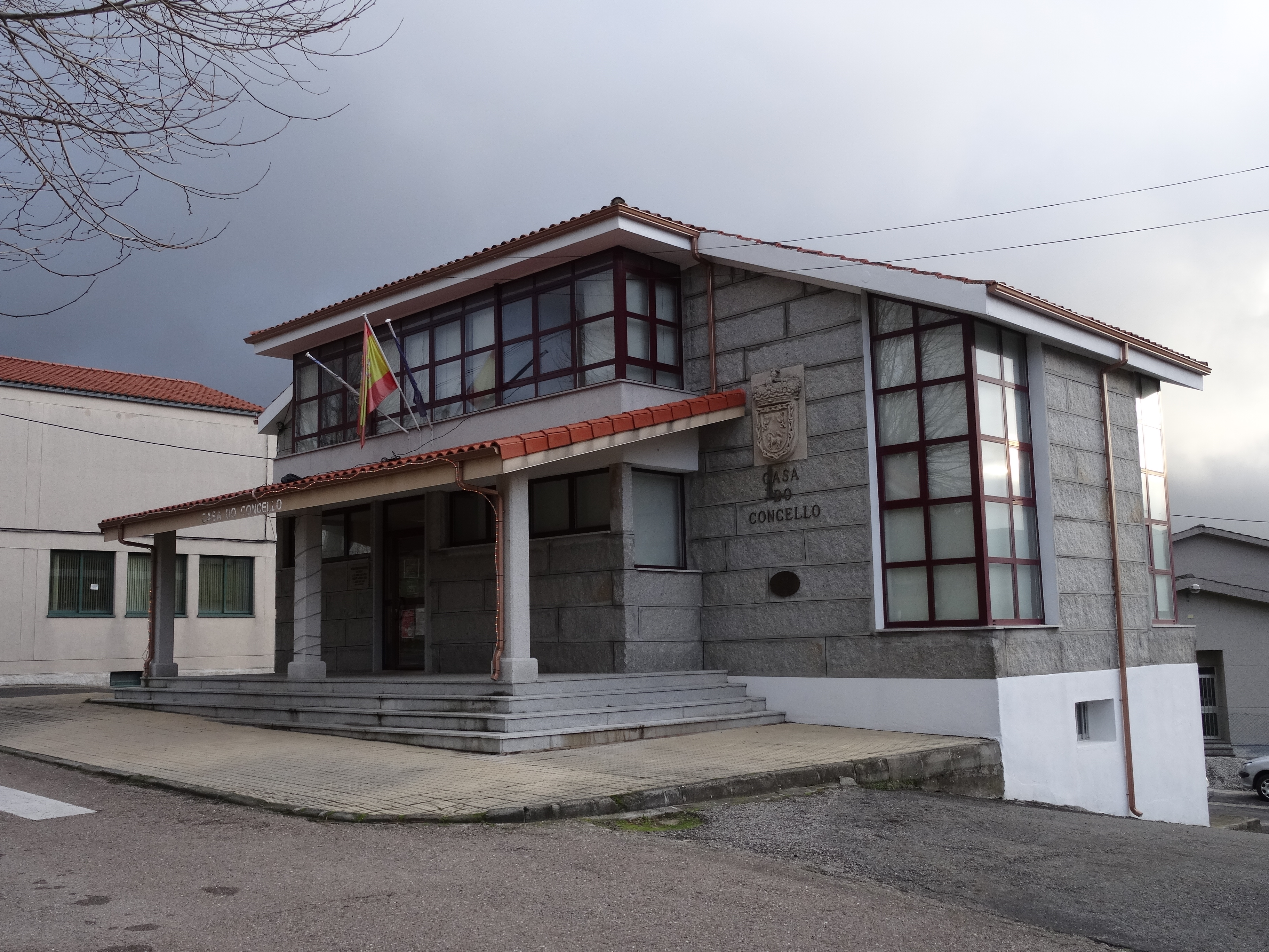 Casa do concello de Baltar, Ourense.